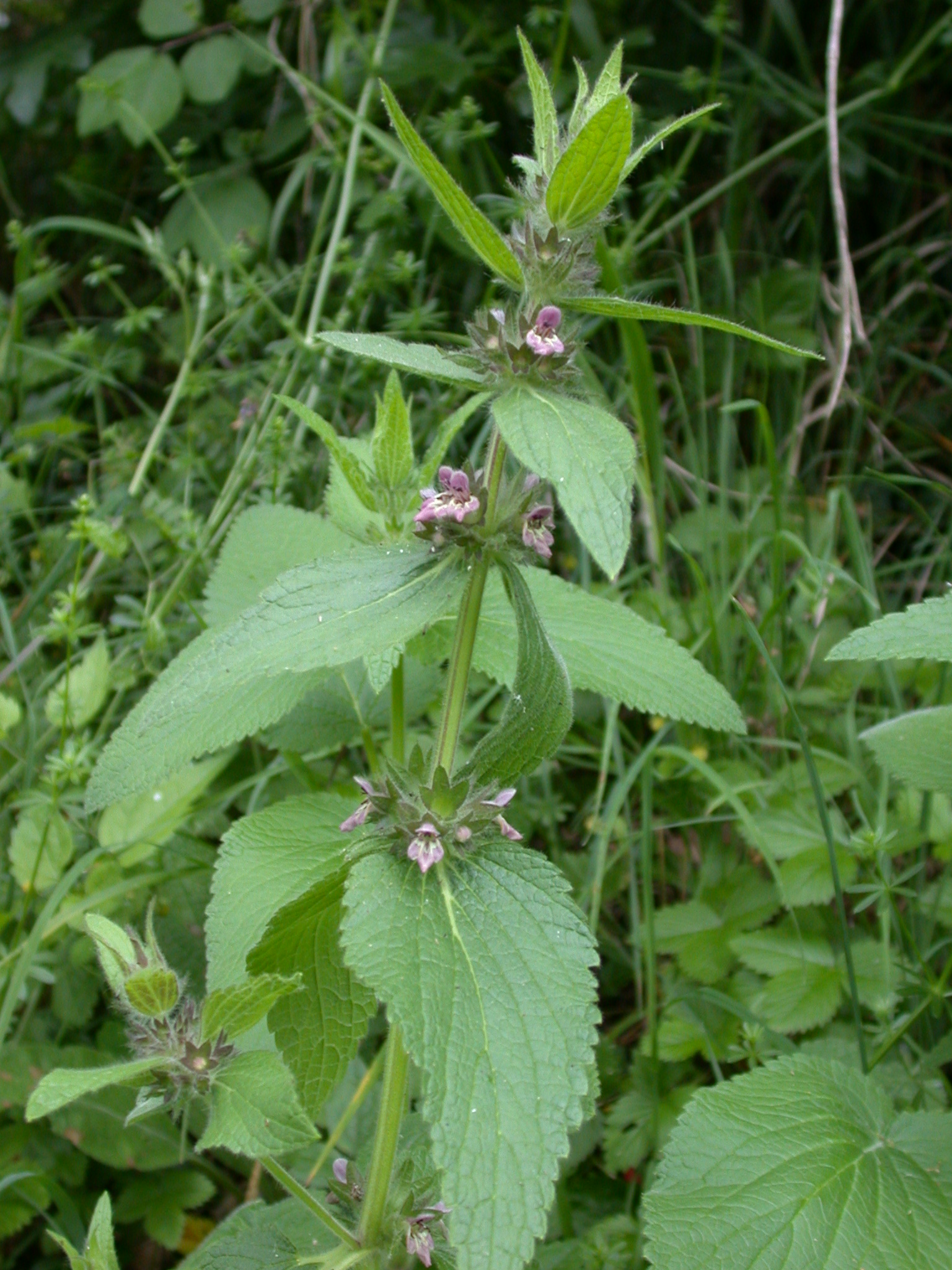 Stachys alpina Fontaine des Carmes (Meuse), France